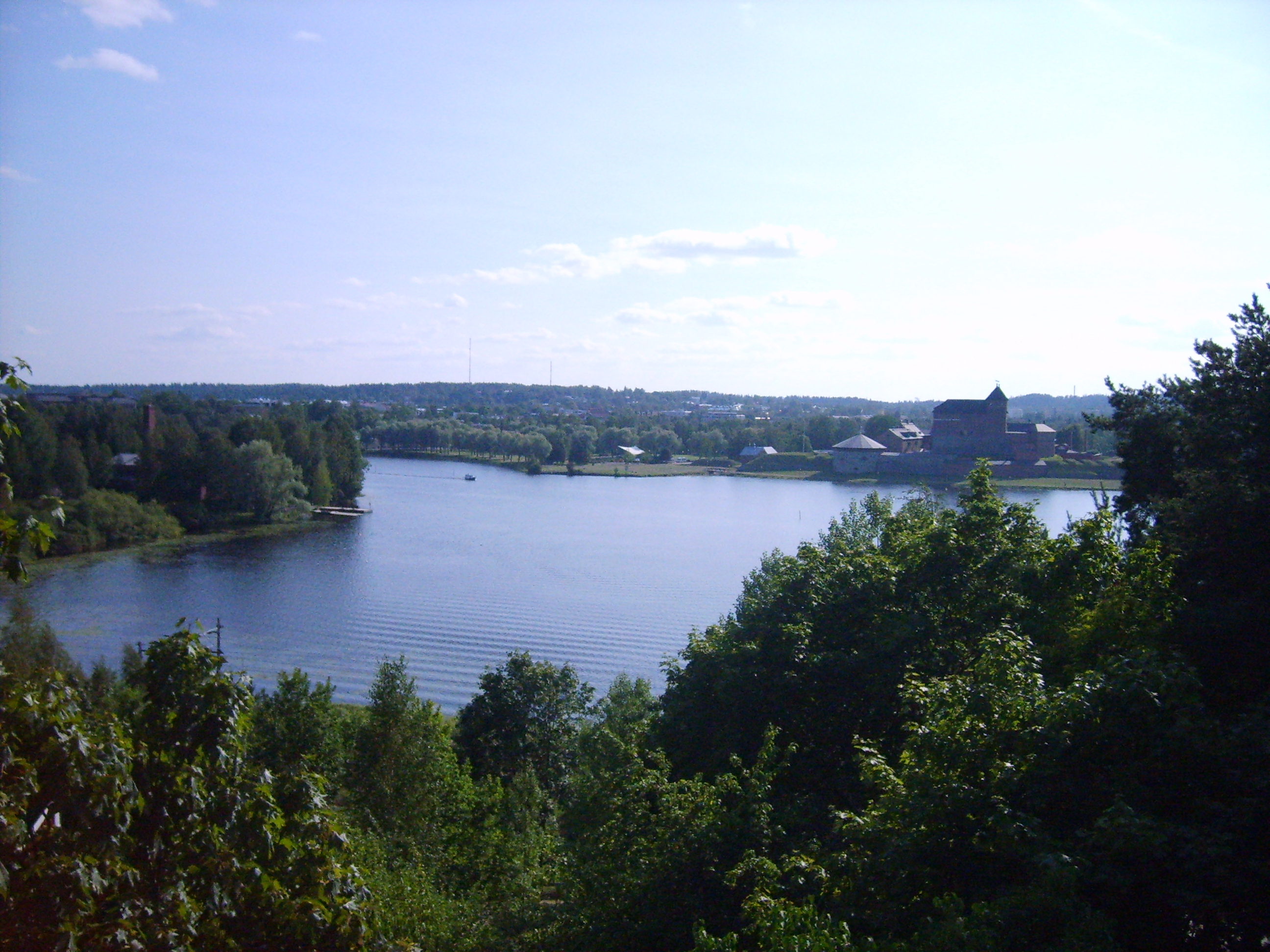 View of lake Vanajavesi, next to Hämeenlinna.